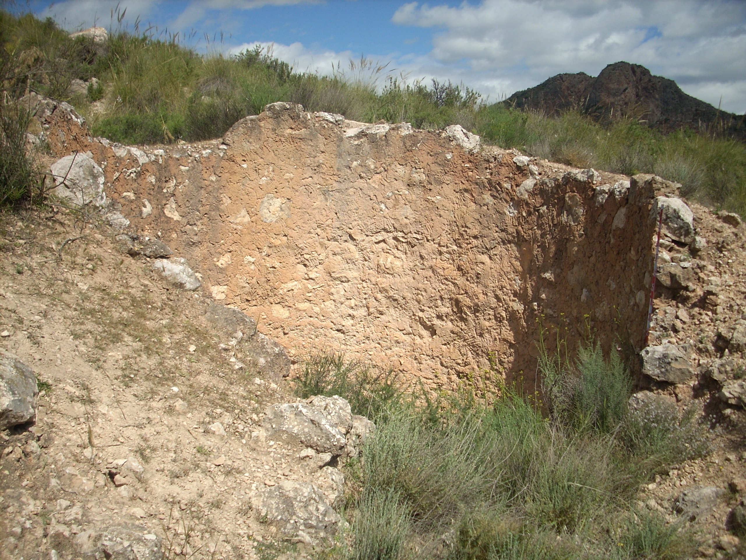 Vista de parte de una vivienda del poblado argárico Peñas de Béjar I